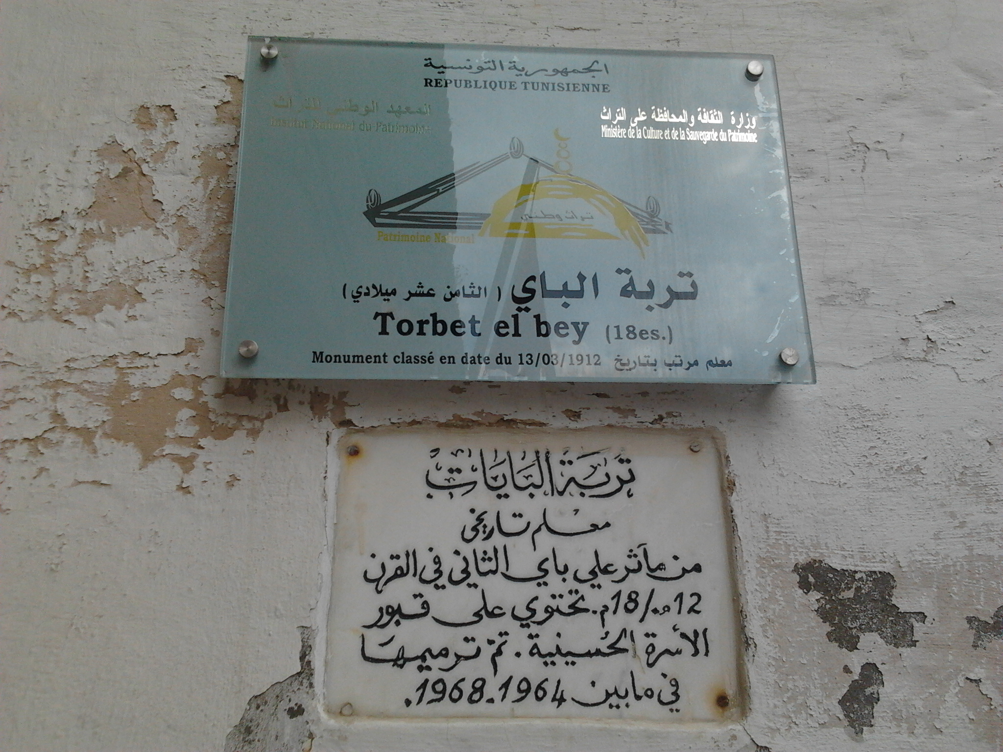 Plaques d'informations de l'INP et de la commémoration de la restauration réalisée entre 1964 et 1968